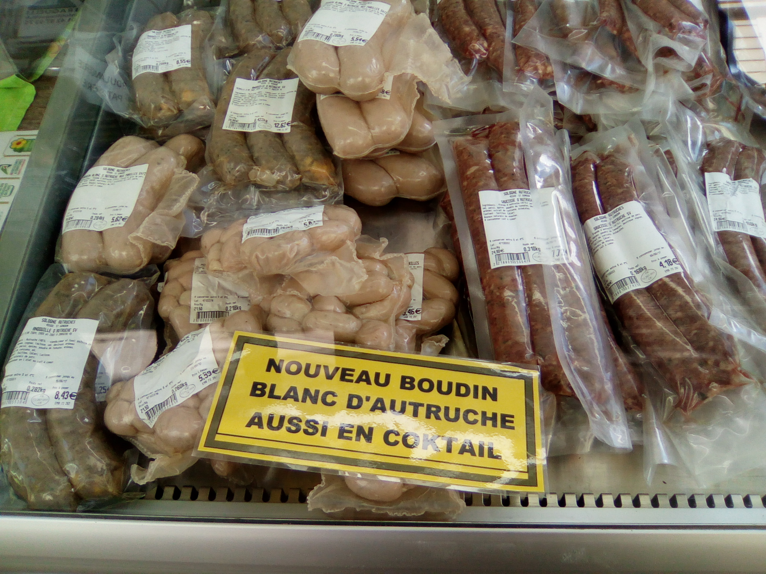 Stand de viande d'autruche au marché des producteurs de pays boulevard de Reuilly.